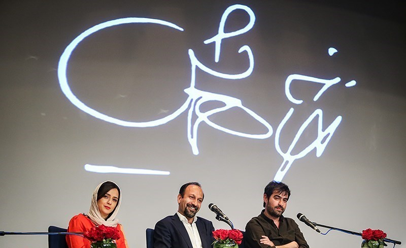 نشست خبری فیلم سینمایی فروشنده با حضور اصغر فرهادی کارگردان و شهاب حسینی و ترانه علیدوستی بازیگران این فیلم شامگاه دوشنبه ۱۰ خرداد ۱۳۹۵ در خانه همایش